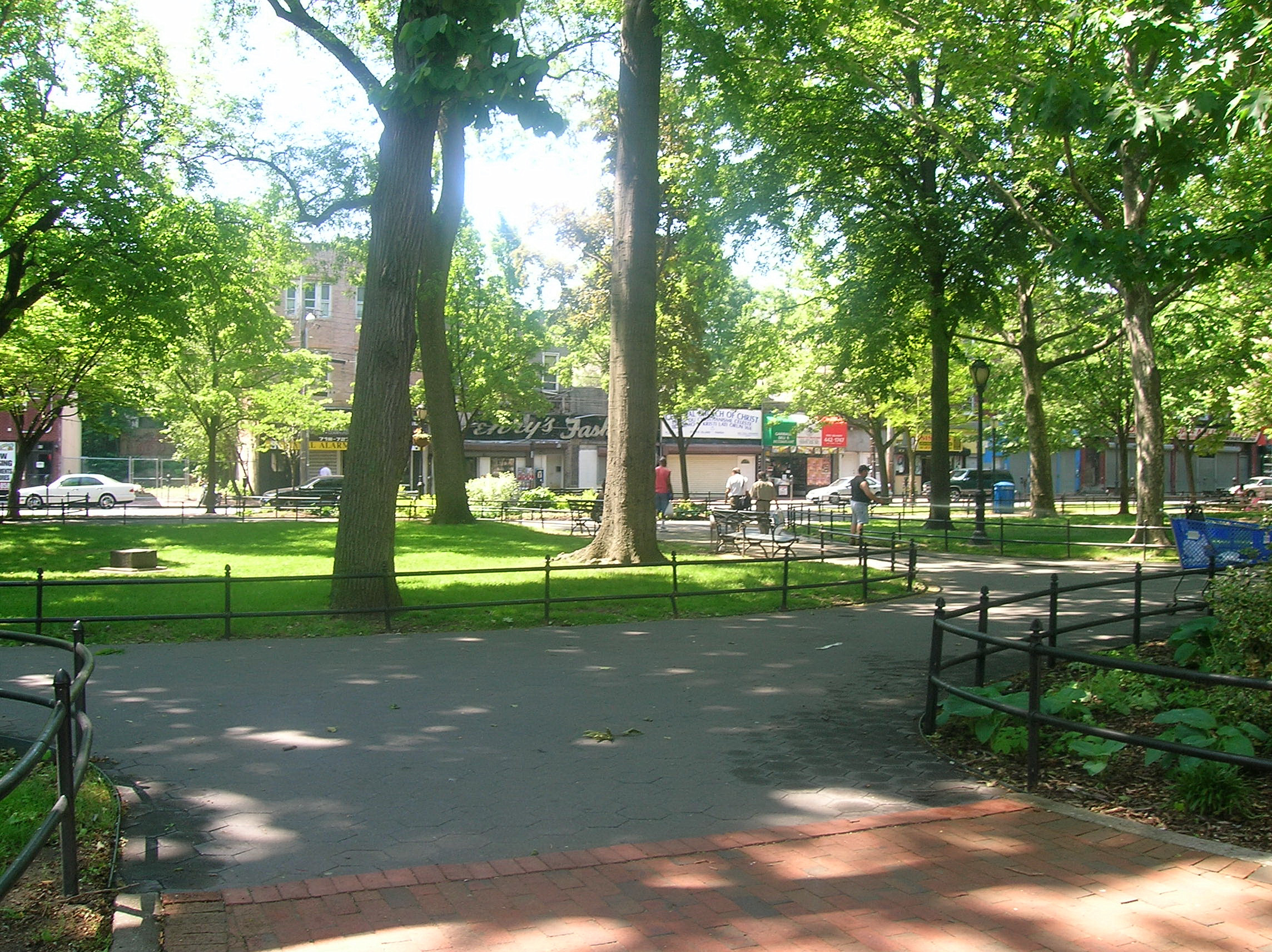 Tappen Park in Stapleton